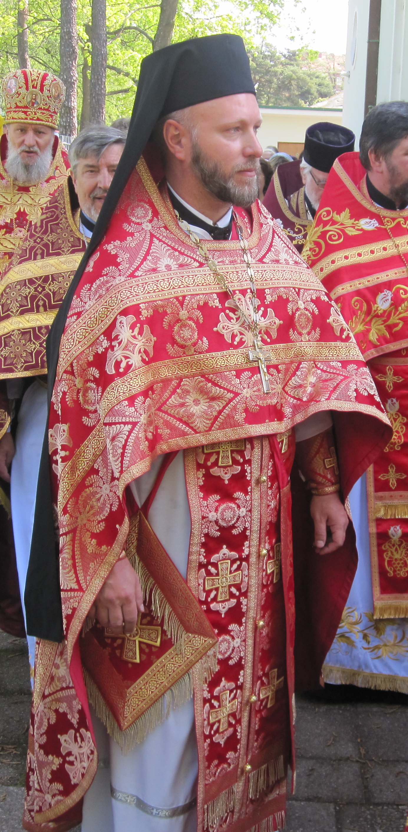 Nikita Dobronravoff igumeni